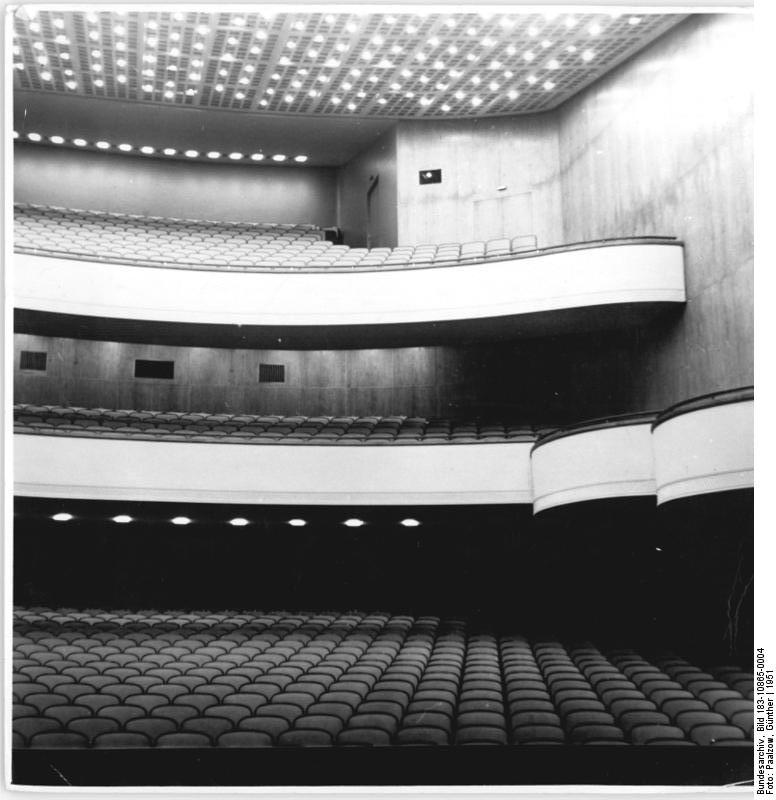 Halle, Stadttheater, Zuschauerraum Illus - Paalzow 2.6.51 Das ehemalige Stadttheater in Halle wurde wiederaufgebaut und am 27.5.1951 als "Theater des Friedens" neu eröffnet UBz: Blick in den Zuschauerraum des "Theaters des Friedens" in Halle.